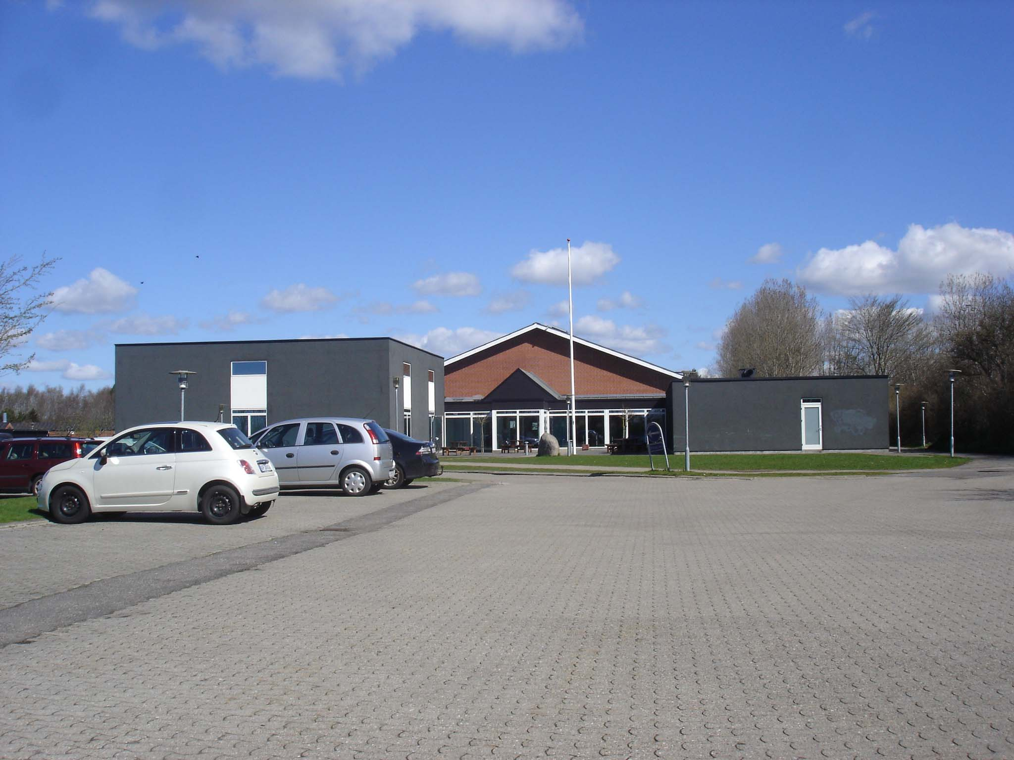 Vester Hassing Hallen